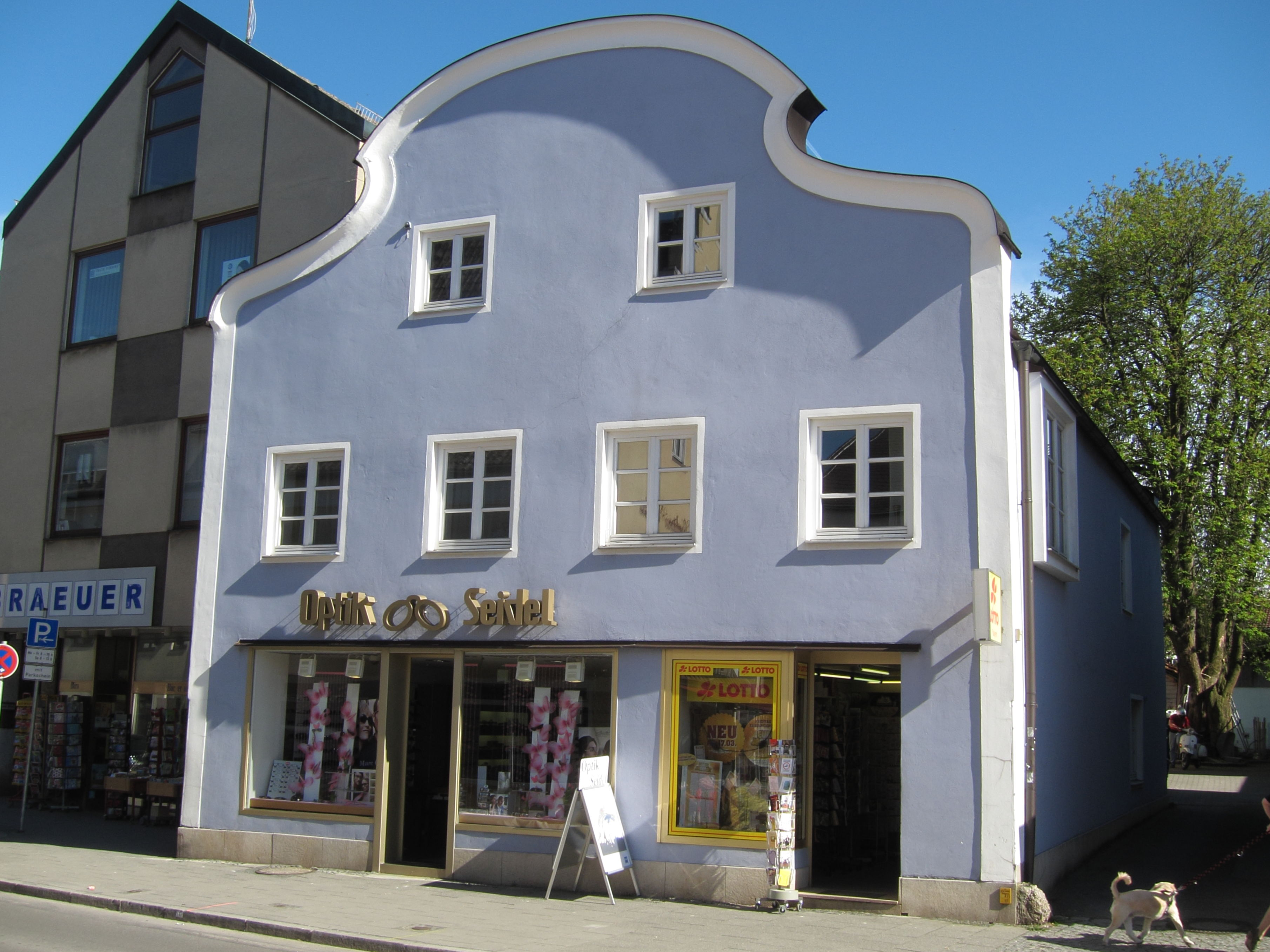 Marktplatz 23; Wohn- und Geschäftshaus, Giebelbau, im Kern 18. Jh., neubarocker Schweifgiebel nach 1905.